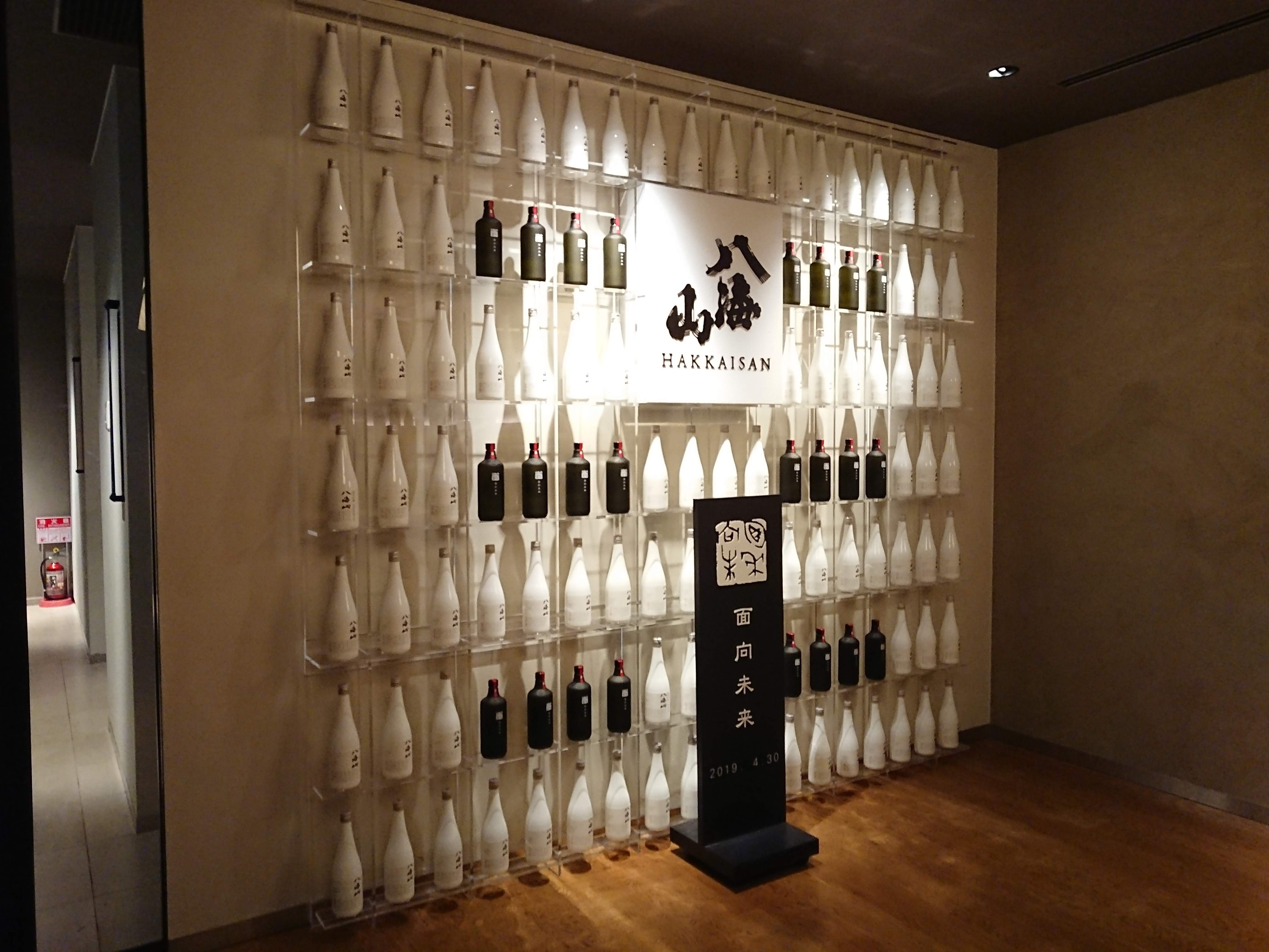 八海醸造館内のブース